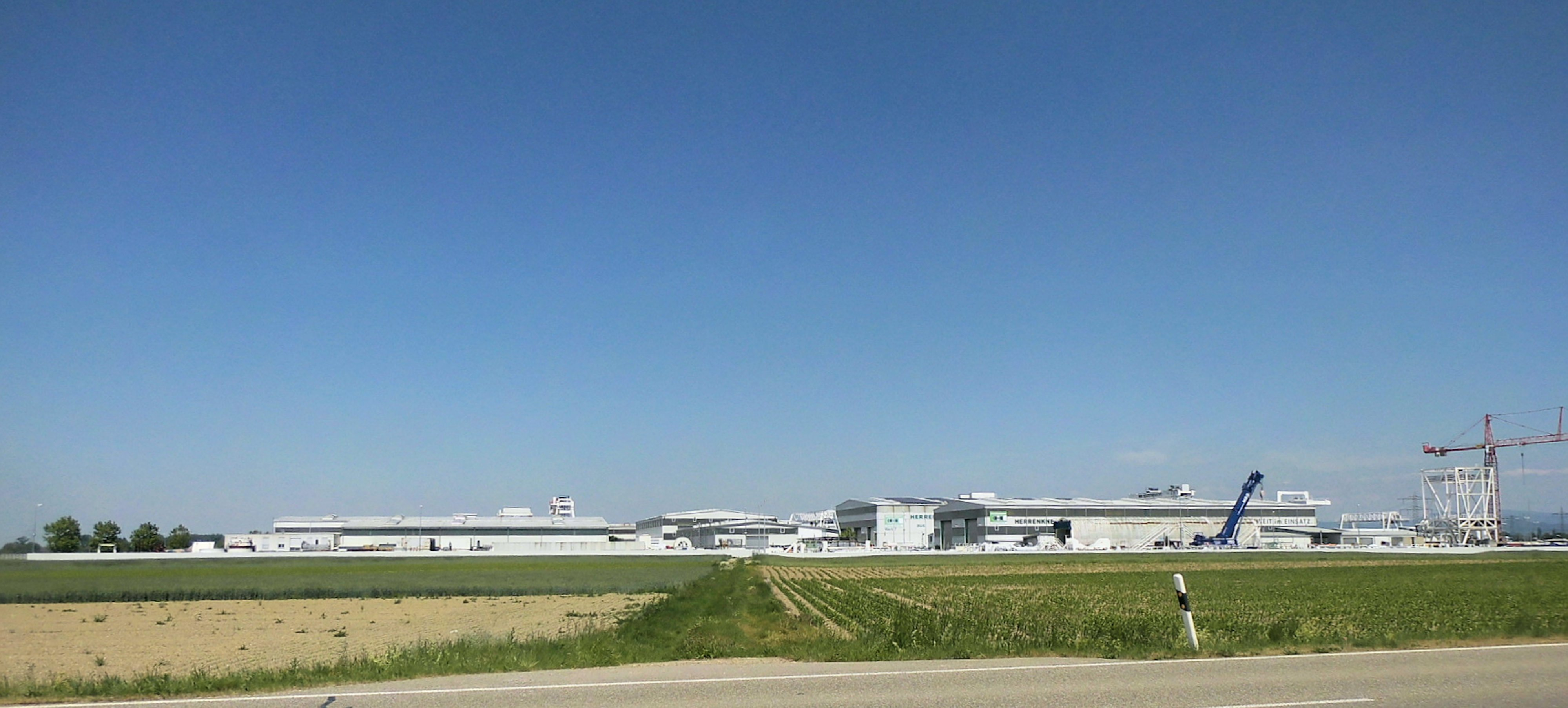 Blick aus Südwesten auf das Stammwerk des Tunnelvortriebsmaschinen-Herstellers Herrenknecht in Allmannsweier, Baden-Württemberg, Deutschland